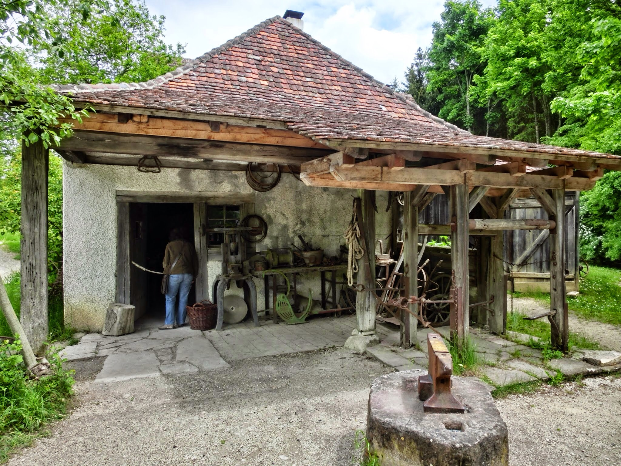 Deutschland - Baden-Württemberg - Landkreis Tuttlingen - Neuhausen ob Eck: Freilichtmuseum - Schmiede